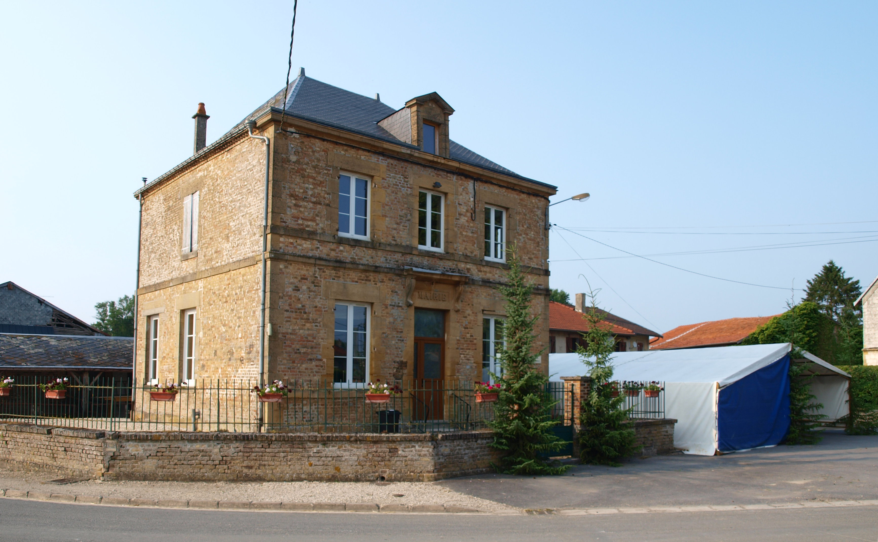 Sugny (Ardennes, France) ; mairie